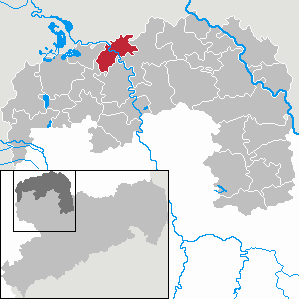 Bad Düben in Saxony - Landkreis Nordsachsen